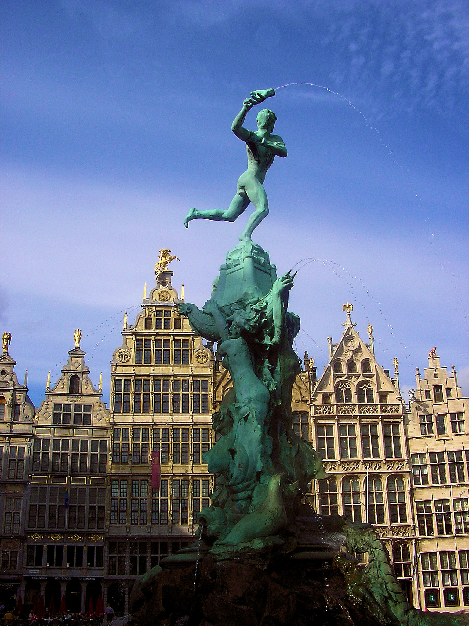 Detalle de la Fuente de Bravo con los edificios gremiales al fondo